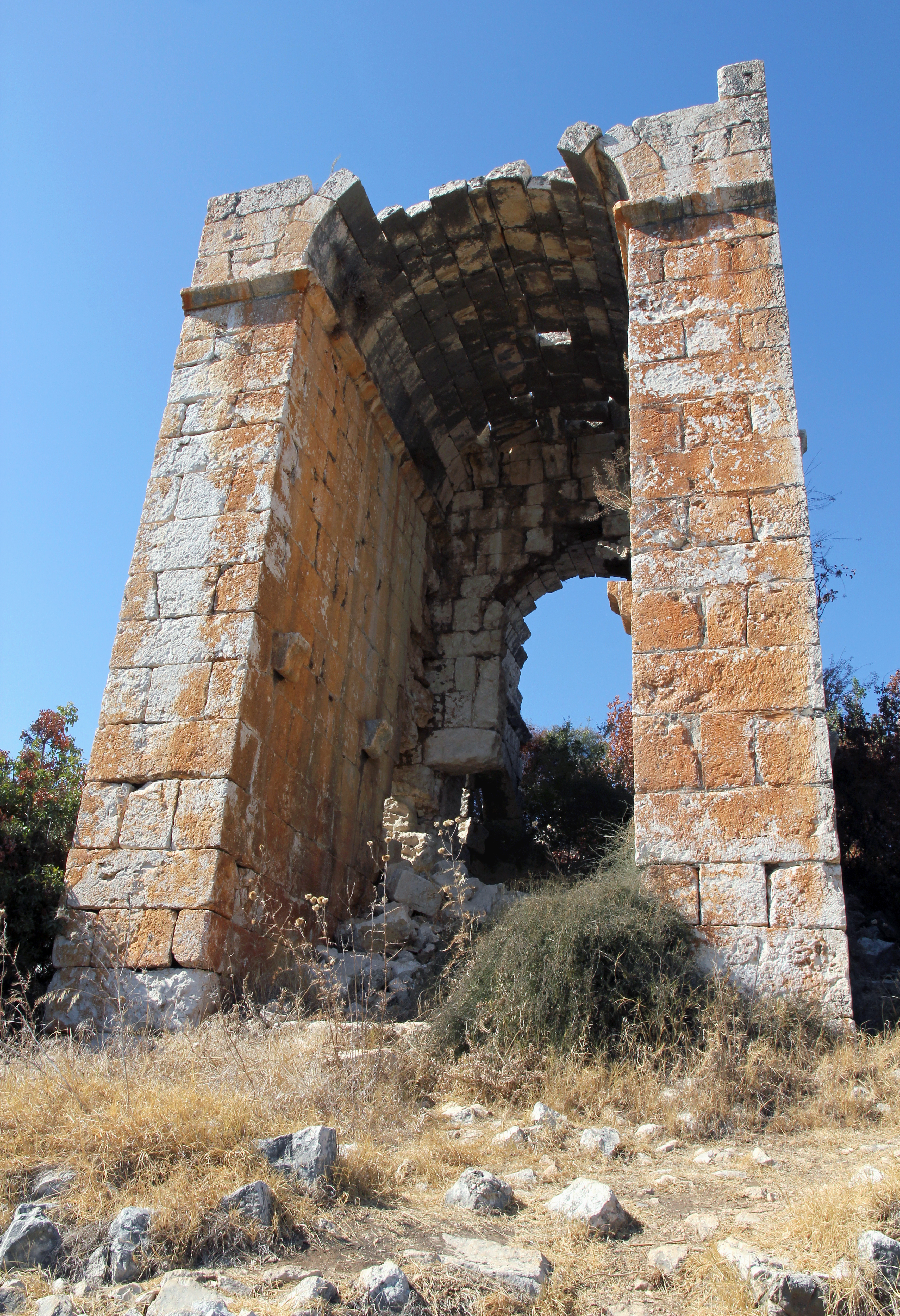 Akkale, byzantinischer Ruinenkomplex bei Kızkalesi, Südtürkei, Hauptgebäude (Palast) Südfassade